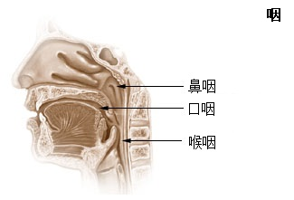 Pharynx